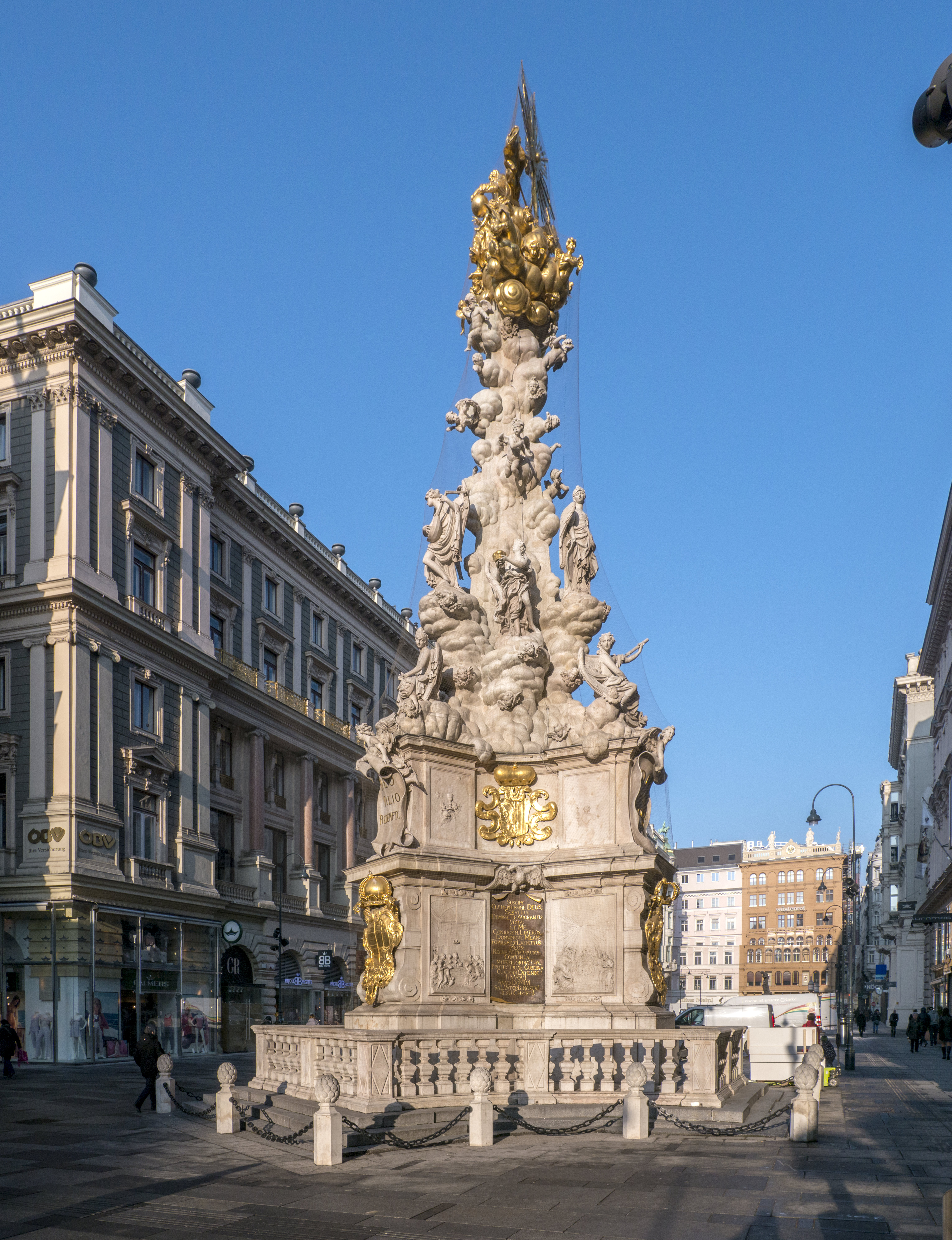 Hl. Dreifaltigkeit und zu den 9 Chören der Engel